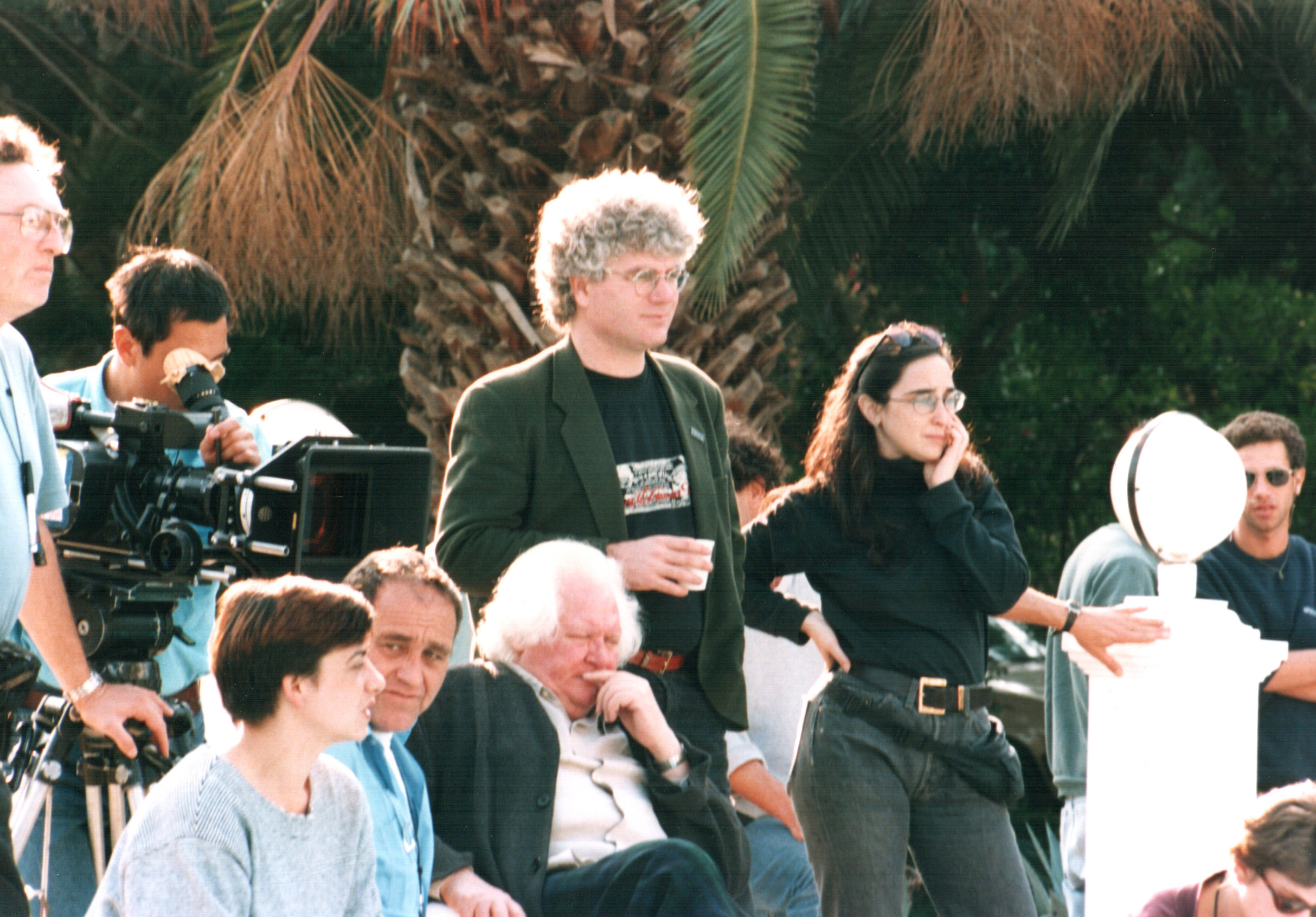 דורון ערן עם הבמאי הבריטי קן ראסל, בהפקת הסרט MindBender